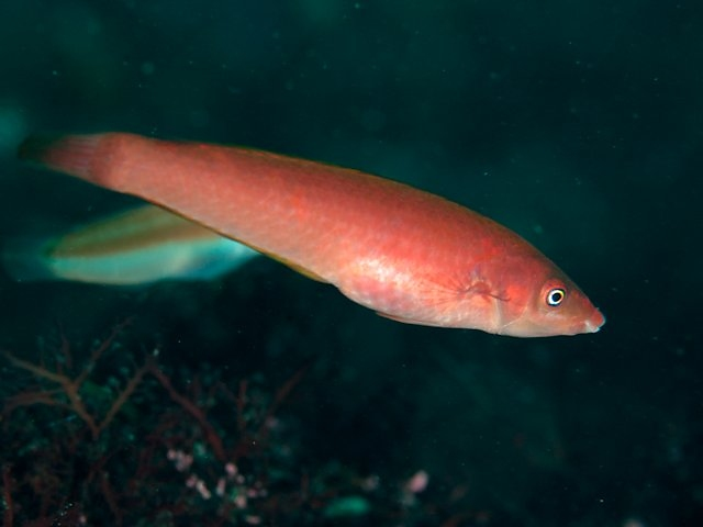 オトヒメベラ Pseudojuloides elongatus